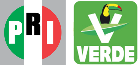 Imagen que contiene a Enrique Peña Nieto y los partidos que conforman la Coalición "Compromiso por México"